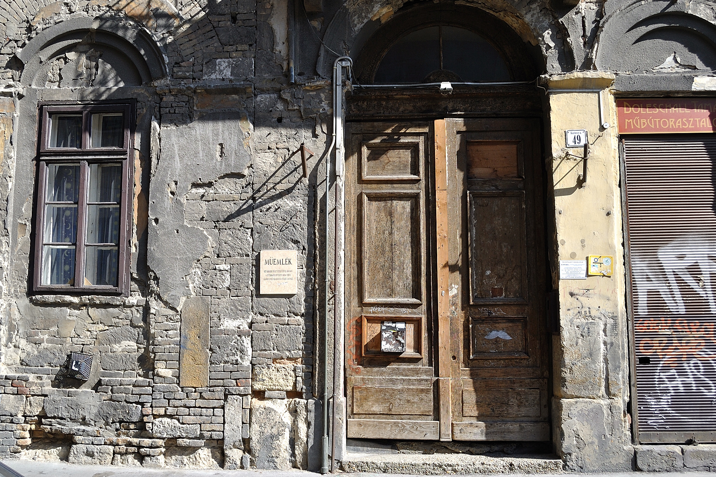 Lakóház (Budapest 7, Kazinczy Ferenc u. 49.) This is a photo of a monument in Hungary, Identifier: 11542